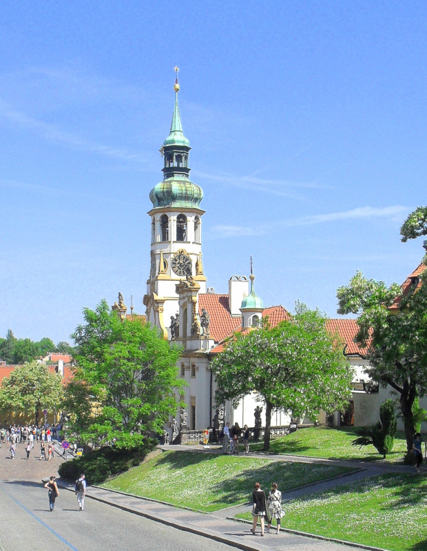 Pražská Loreta, Praha 1, Loretánské nám. 100/7, Hradčany